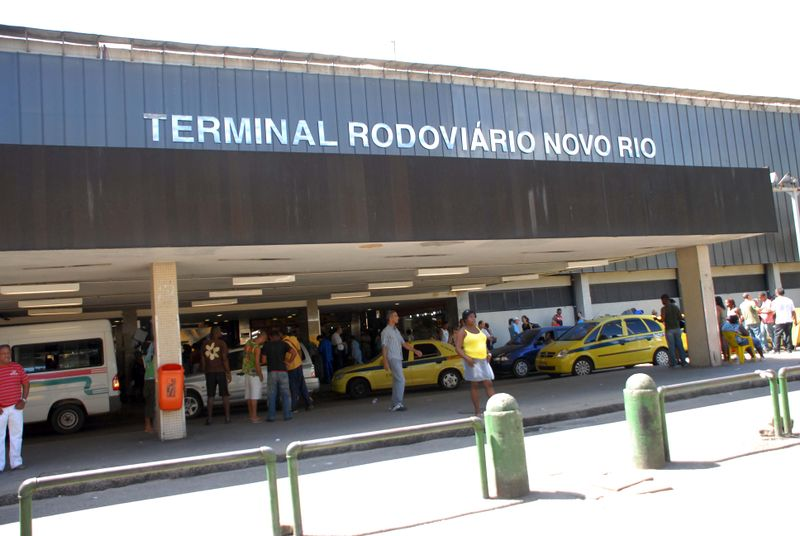 Rodoviária Novo Rio, situado na Avenida Francisco Bicalho, em Santo Cristo, Rio de Janeiro, Brasil. Esta foto foi tirada para ser incorporada ao site e disponibilizada ao público sem restrições.